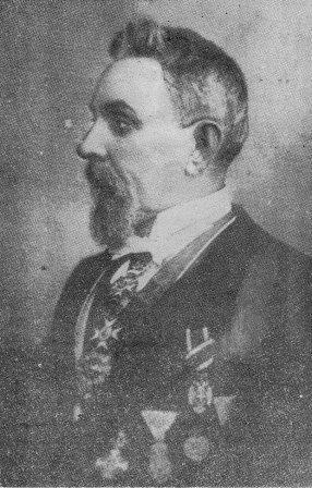 Todor Milovanović, nišlija, dugogodišnji predsednik niške opštine, učesnik ratova za oslobođenje Srbije od Turaka u 19. veku. Slika preuzeta sa ovog sajta nastala je pre 1. januara 1954 godine, pa se može podvesti pod poštenu upotrebu.